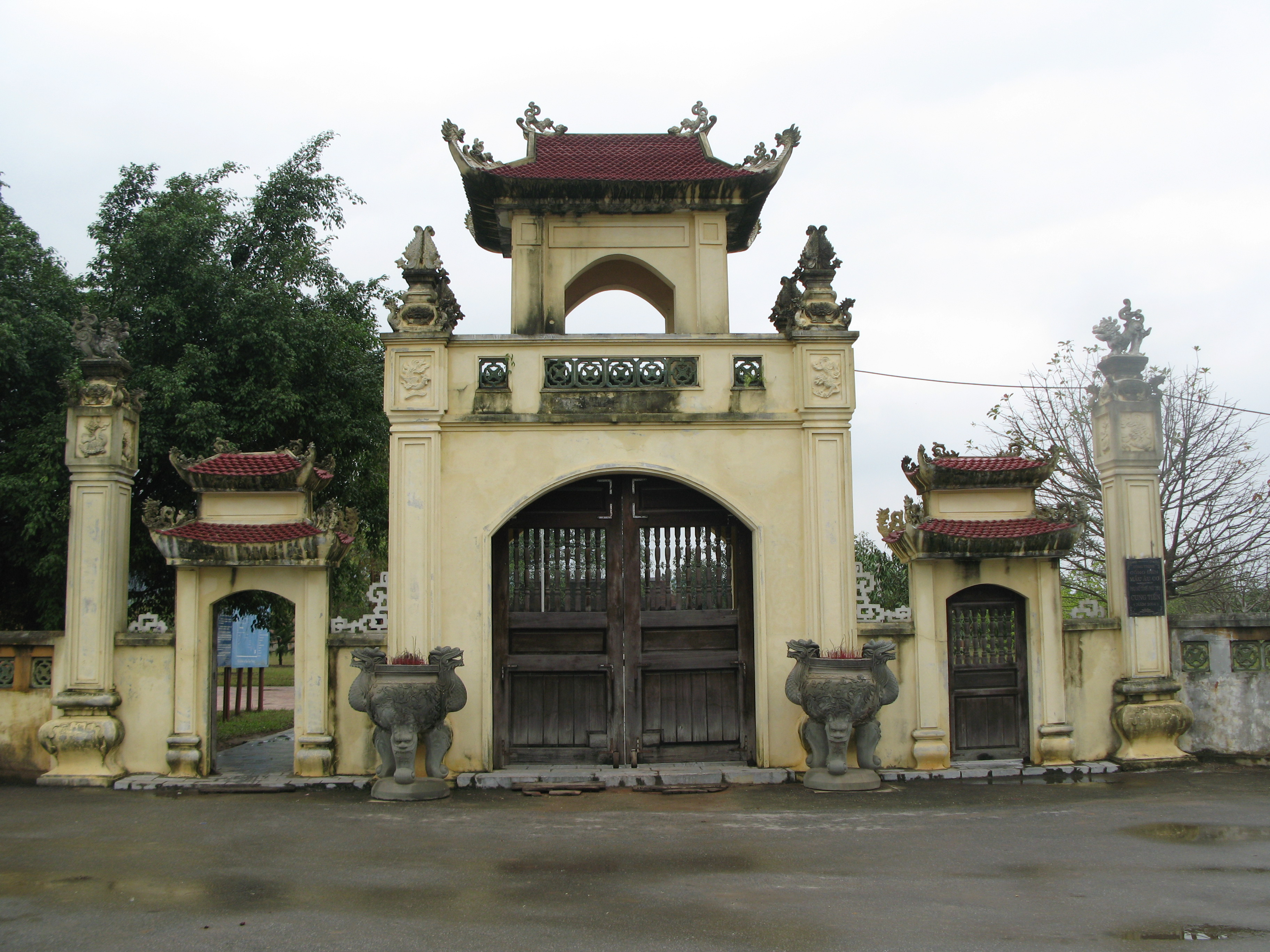 Cổng vào Đền Mẫu Âu Cơ, huyện Hạ Hòa, Phú Thọ